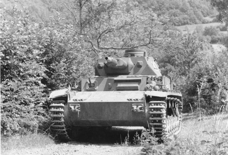 Panzer des 1. Pz-Rgt. 4. Komp. kommen aus der Deckung, sichern und gehen in Feuerstellung. 22.6.40, 8-8,20 Uhr, Servance